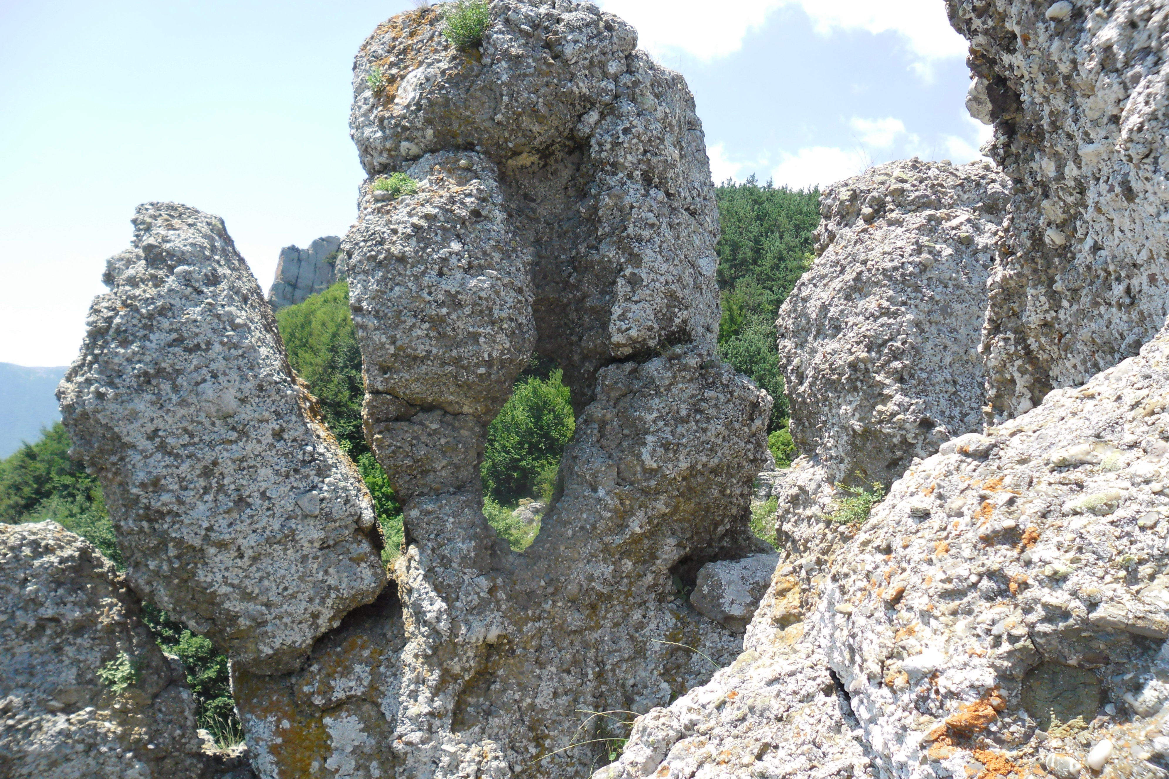 Фото